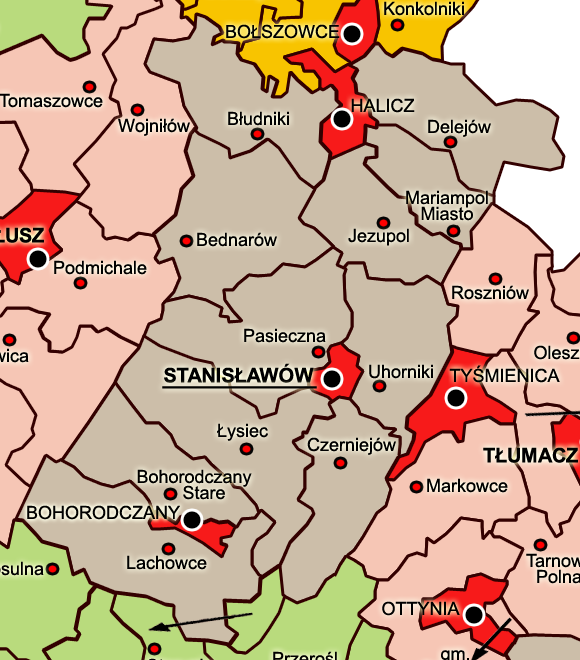 Станіславський повіт